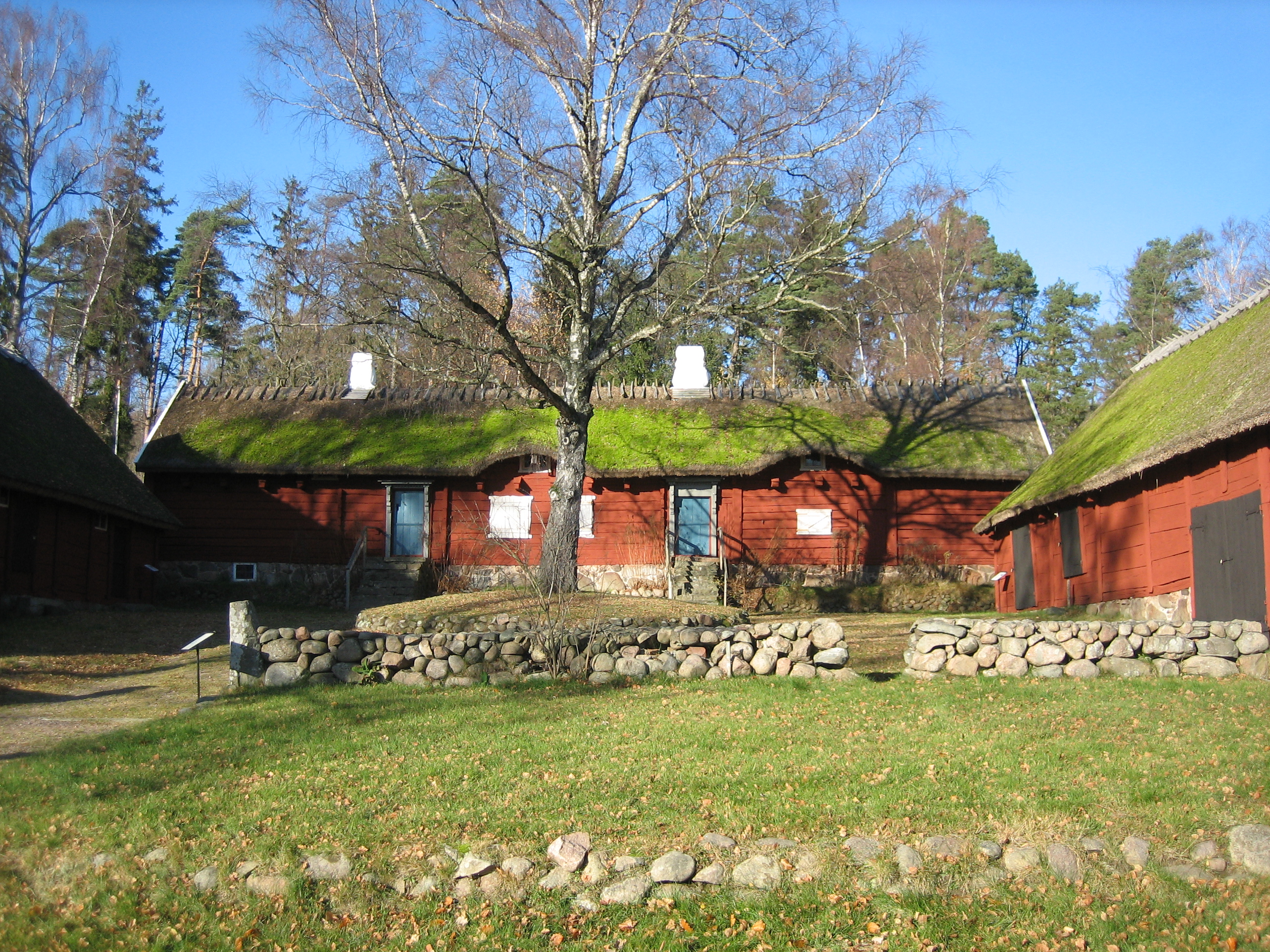 Några av byggnaderna på Hallandsgården på Galgberget i Halmstad.